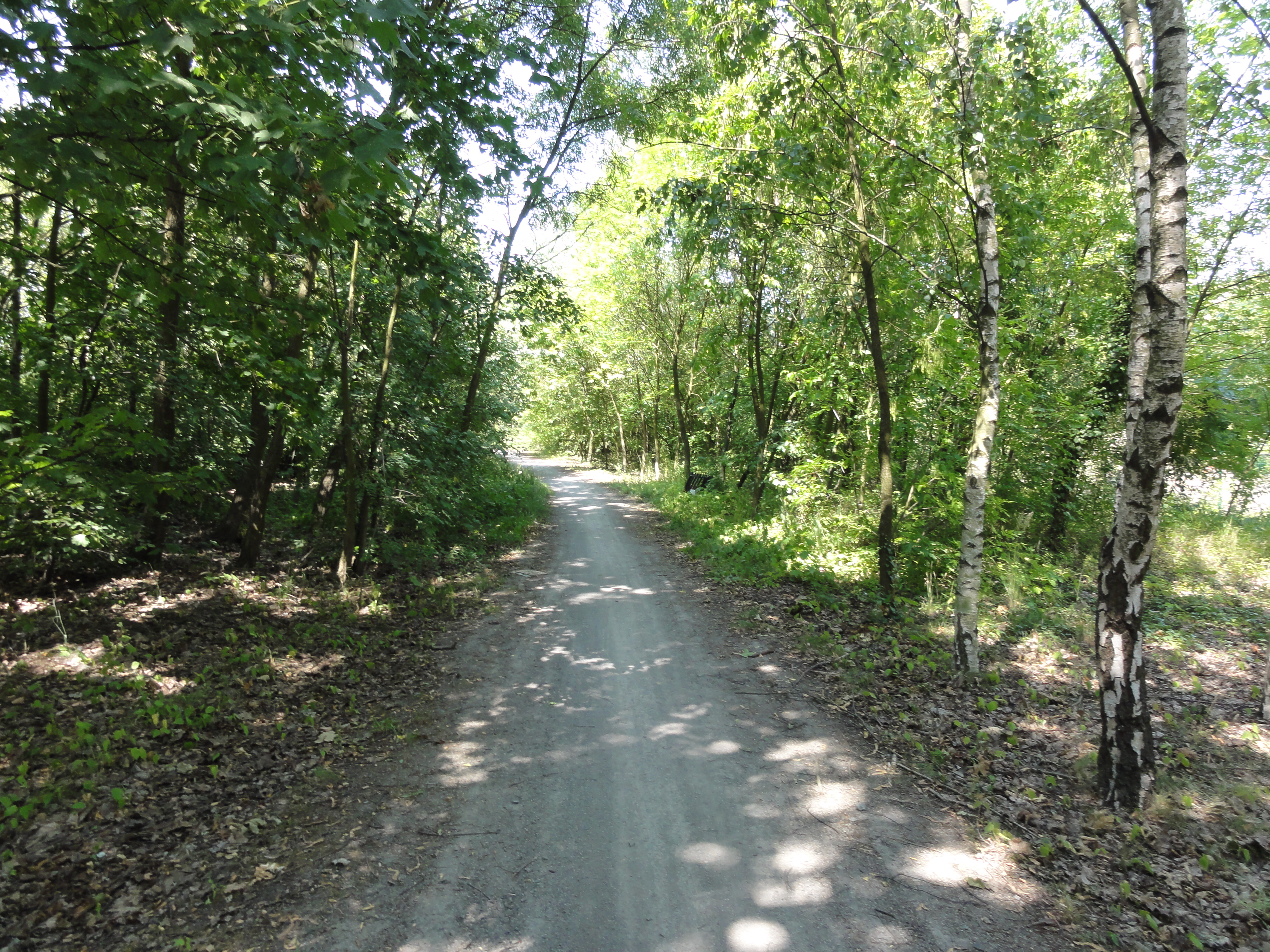 Terril n° 213C dit Cavalier de Roost-Warendin, Compagnie des mines de l'Escarpelle, Auby, Nord, Nord-Pas-de-Calais, France.